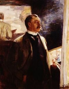 Jan Willem Sluiter Hans von Bartels. Jahr 1898??